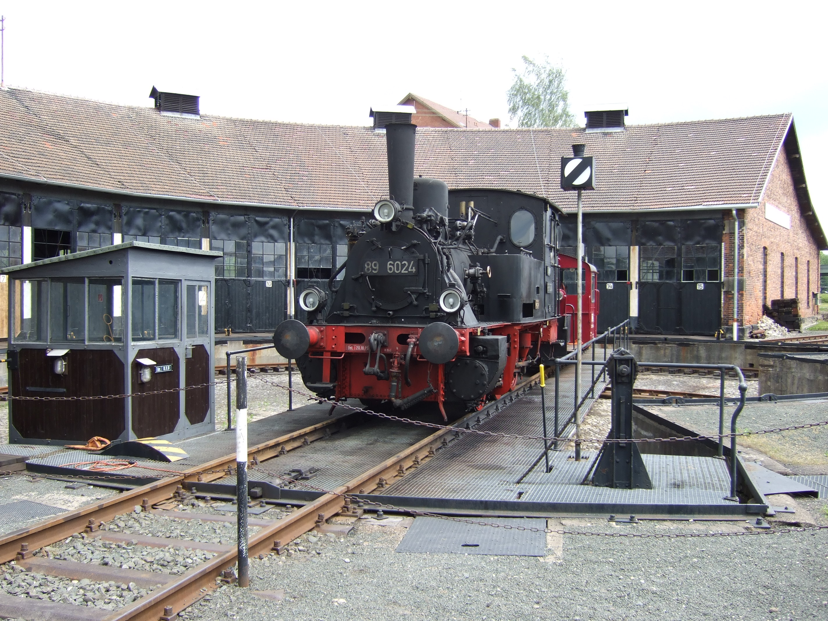 DDM 89 6024 auf der Drehscheibe